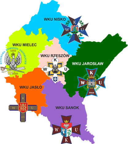 mapka terenu